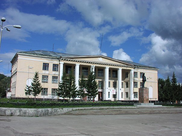 центр города